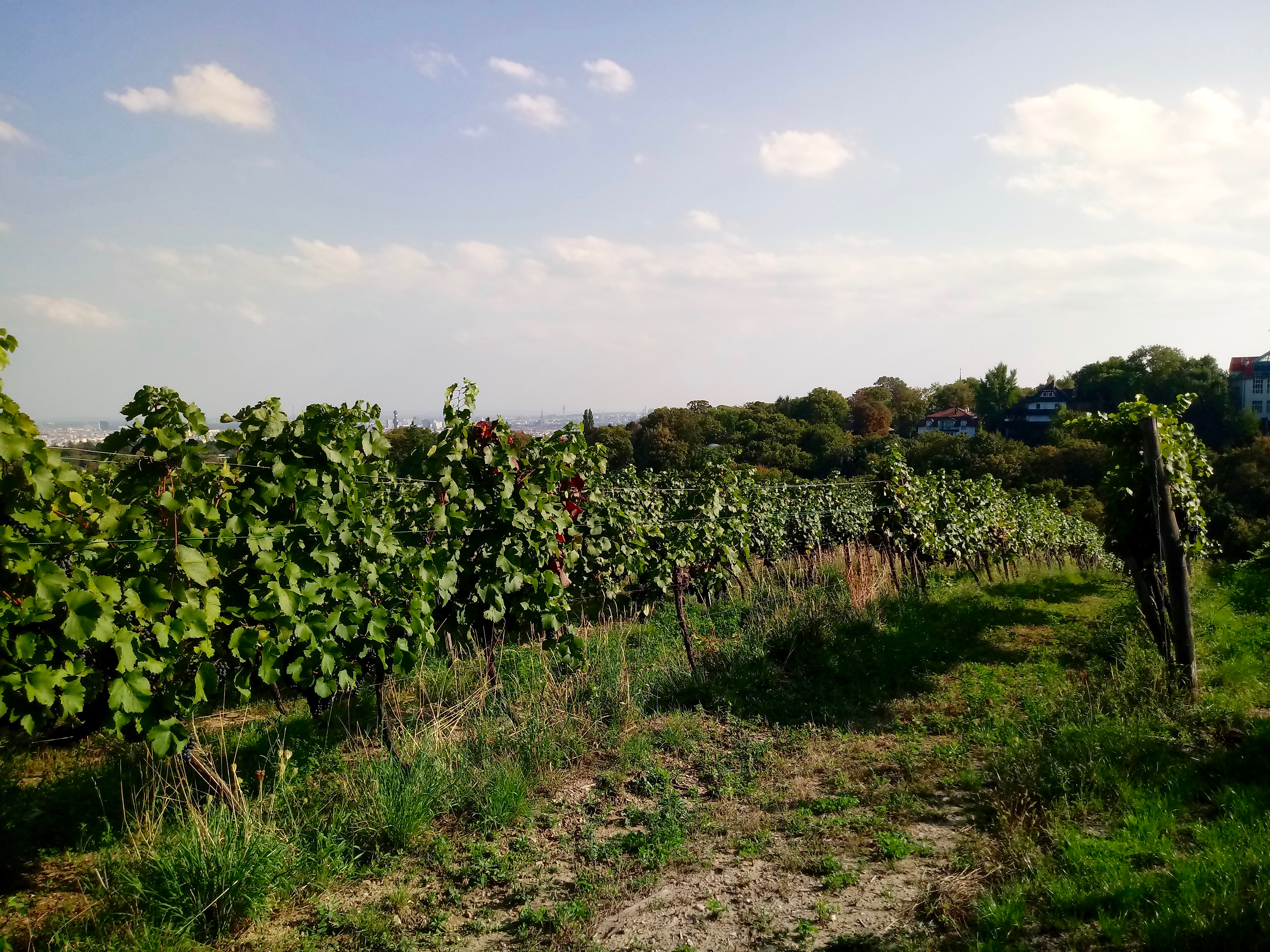 Riede Kleben in Wien-Grinzing.